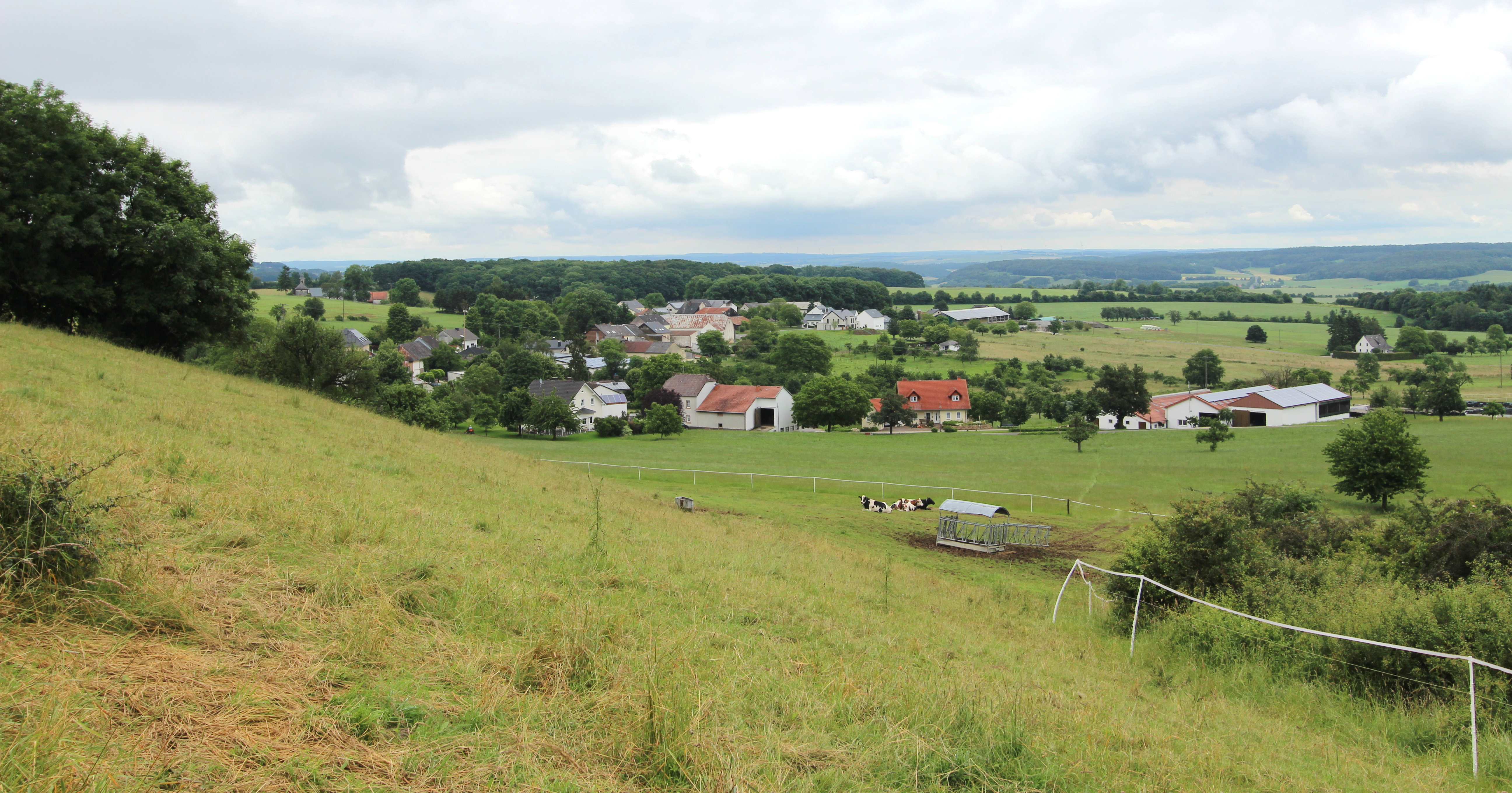 D-54646 Olsdorf; Panoramablick. Aufnahme aus Süd-Westen von 2016.